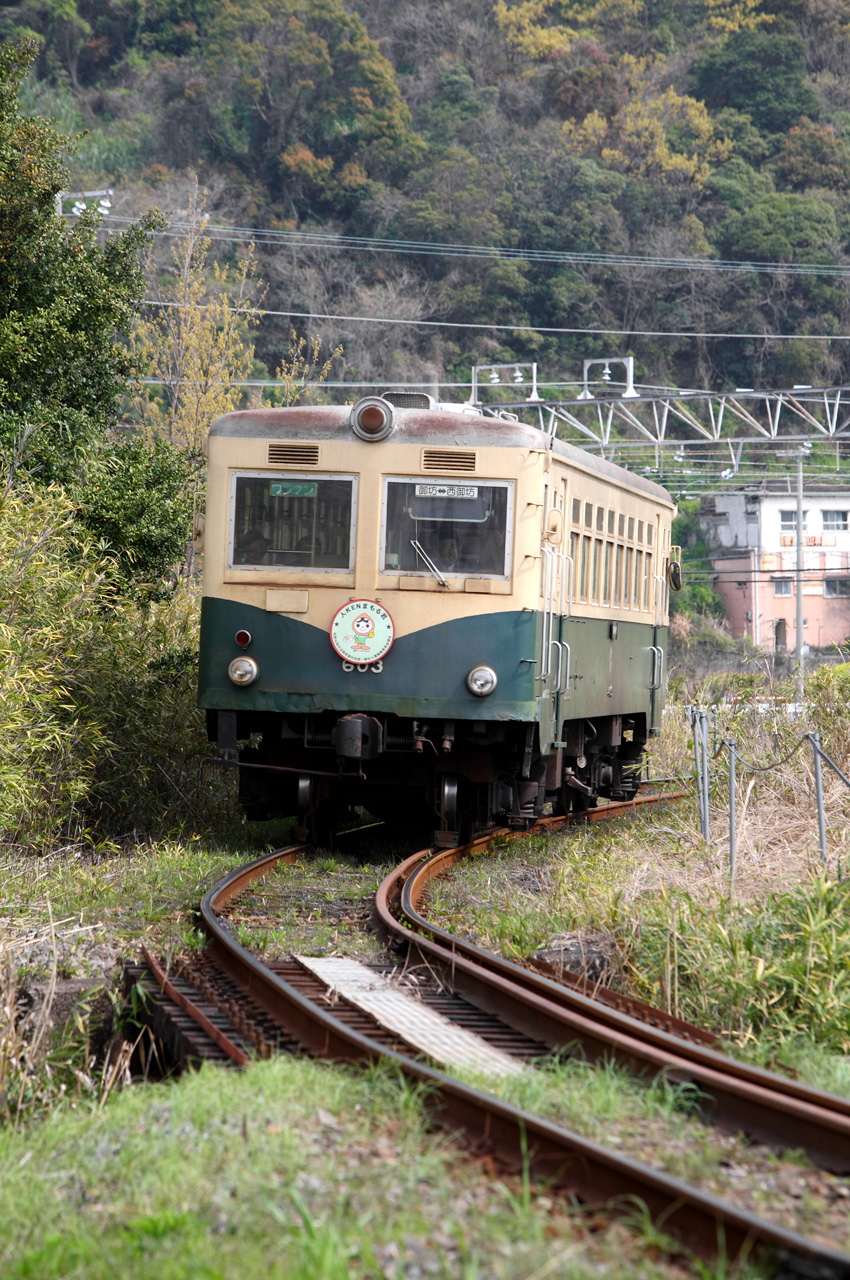 Kishu Railway Kiha 600